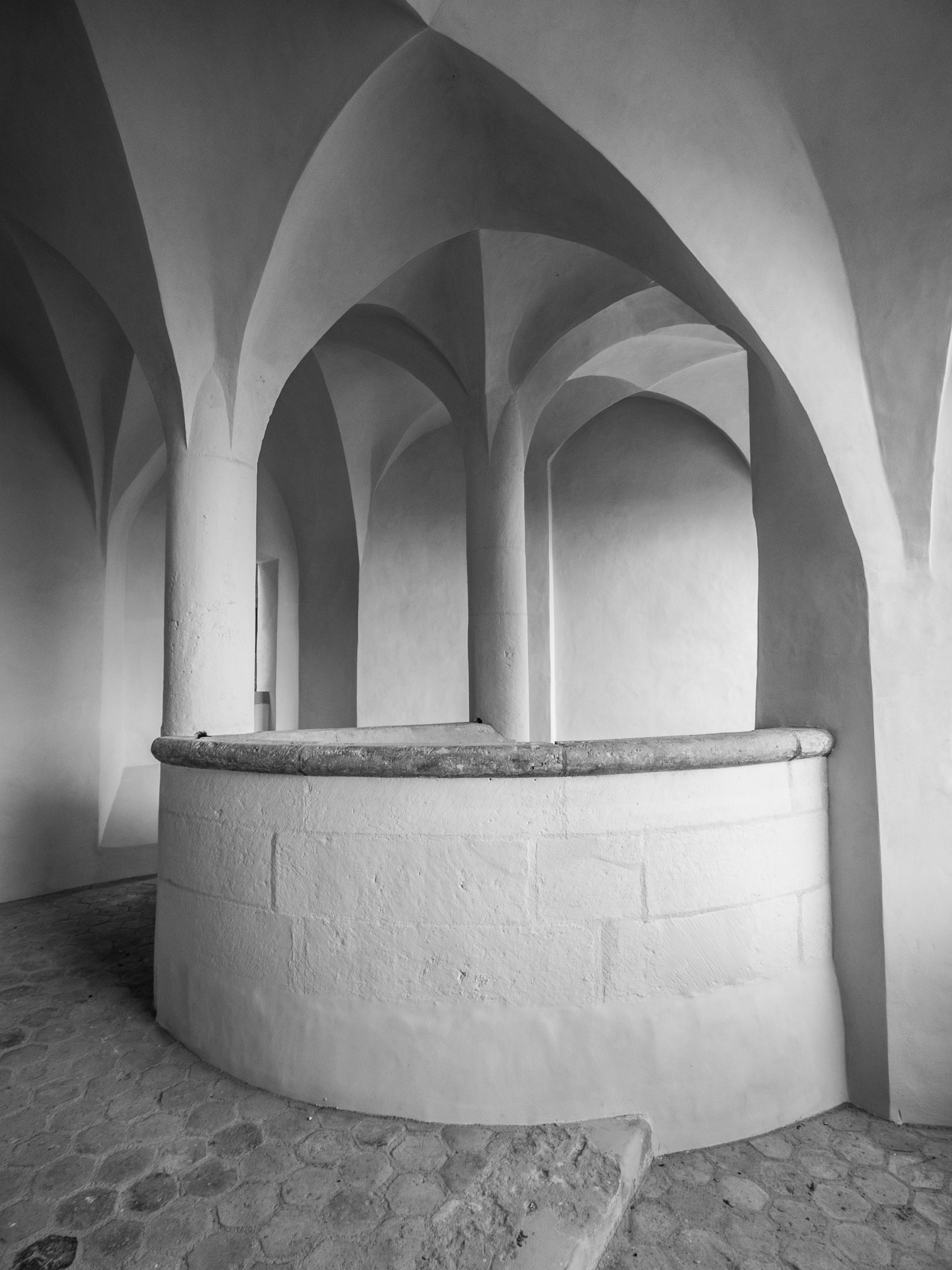 Südliches Treppenhaus. Das Schloss Wittenberg wurde ab 1489 unter Kurfürst Friedrich dem Weisen von Sachsen als Residenzschloss errichtet